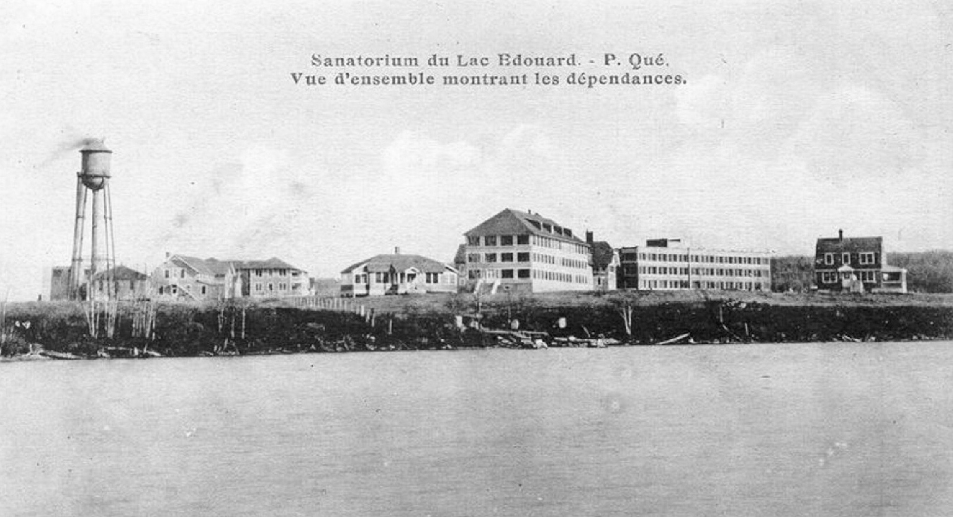 Photo d'inauguration des travaux de construction et d'agrandissement au sanatorium du lac Édouard par le gouvernement du Québec.